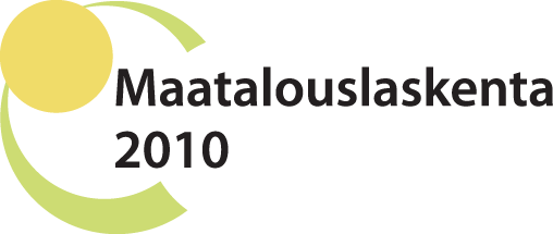 Maatalouslaskenta 2010 logo